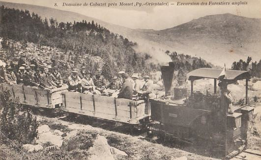 Decauville 020 Type 1 de 3,250 tonnes, n° 412 'Steatite'